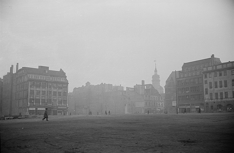 Original image description from the Deutsche Fotothek Platz in der Innenstadt Durch Abriss kriegszerstörter Gebäude zwischen der Reichsstraße und der Katharinenstraße entstandene Freifläche, auf der später der Sachsenplatz entstand.